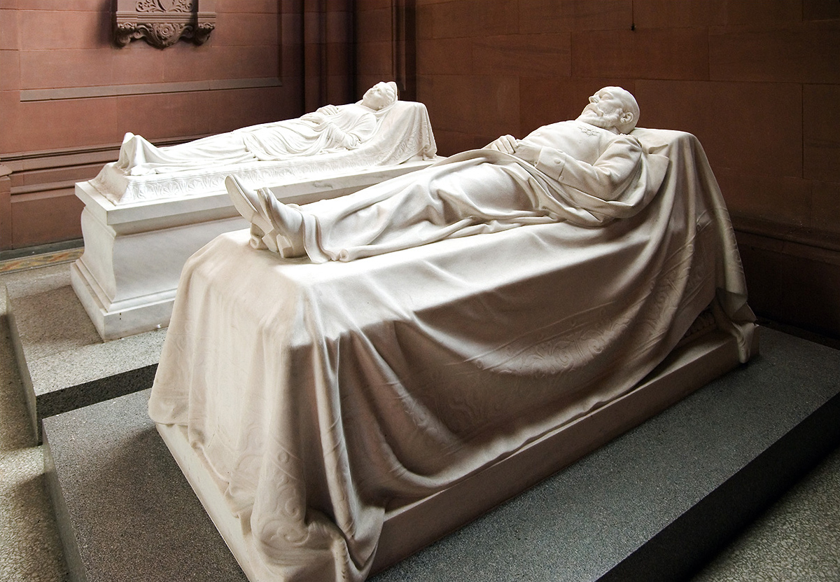 Anlässlich des Tags des offenen Denkmals am 10.09.2006 konnte man die sonst nicht offen zugängliche fürstliche Grabkapelle in Karlsruhe besichtigen. In der großen Halle finden sich drei prachtvolle Grabmäler aus weißem Carrara-Marmor mit lebensgroßen Figuren von Großherzog Friedrich I. von Baden, seiner Gemahlin Prinzessin Luise von Preußen (Bild) und ihrem Sohn Prinz Ludwig Wilhelm. Professor Hermann Volz schuf diese Kunstwerke so täuschend ähnlich, dass man glaubt Lebende vor sich zu haben.